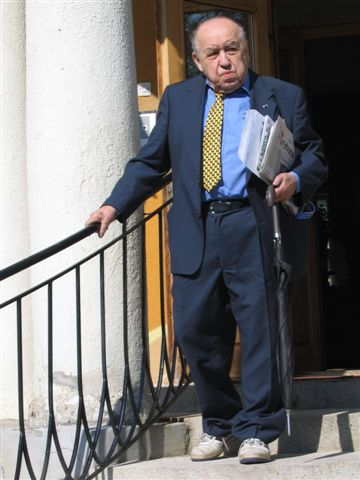 Bohdan Osadchuk (1920-2011), Ukrainian journalist, living in Berlin, Deutschland